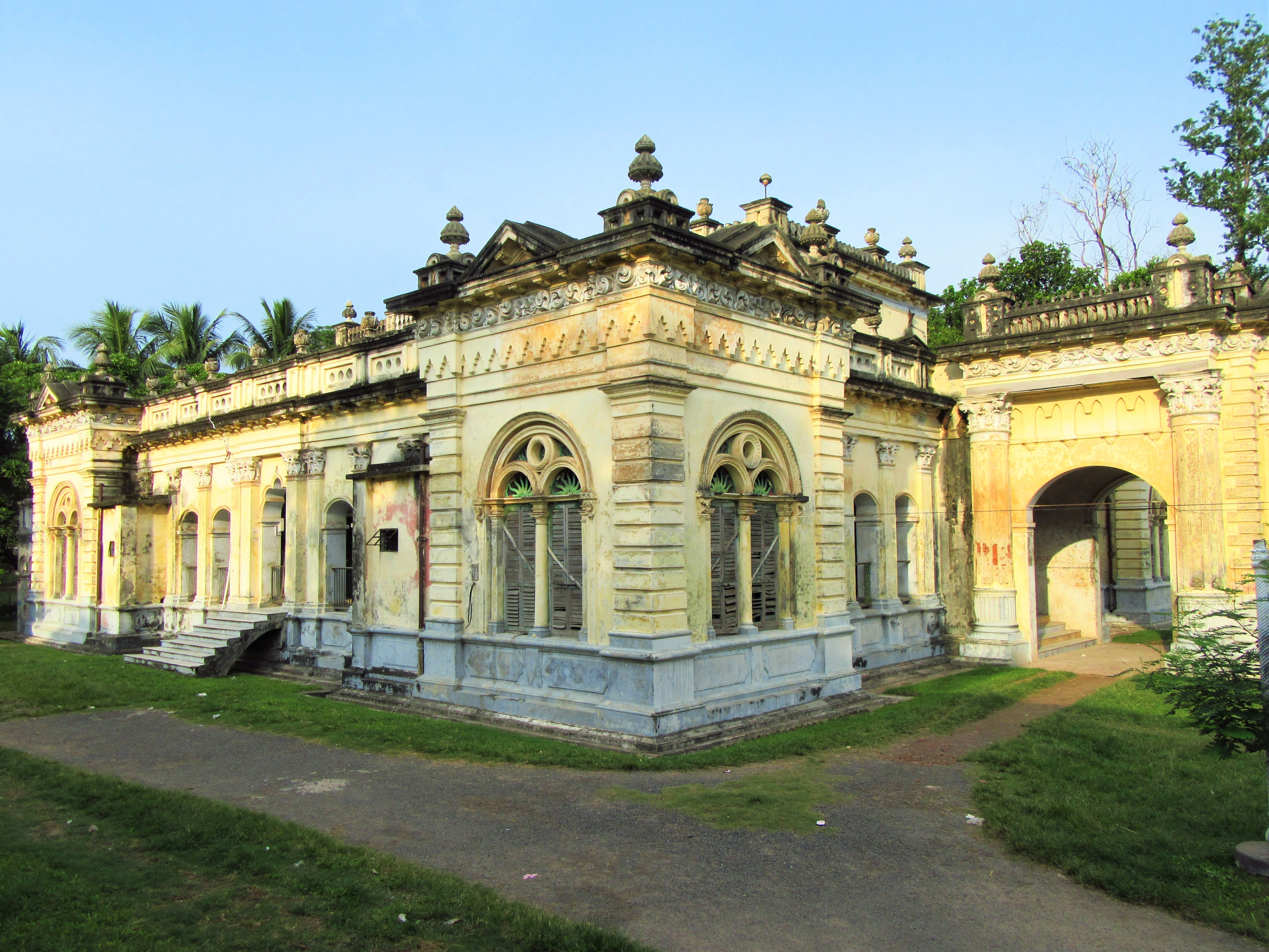 নাটোর রাজবাড়ী প্যালেসের একপাশ